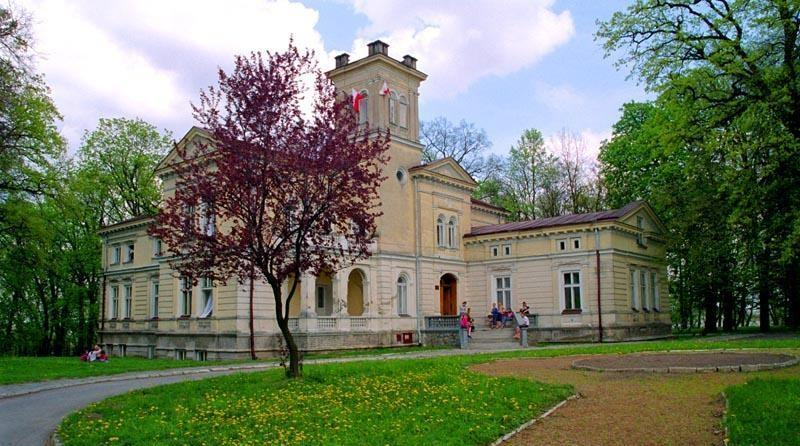 Pałac Moszyńskich w Łoniowie